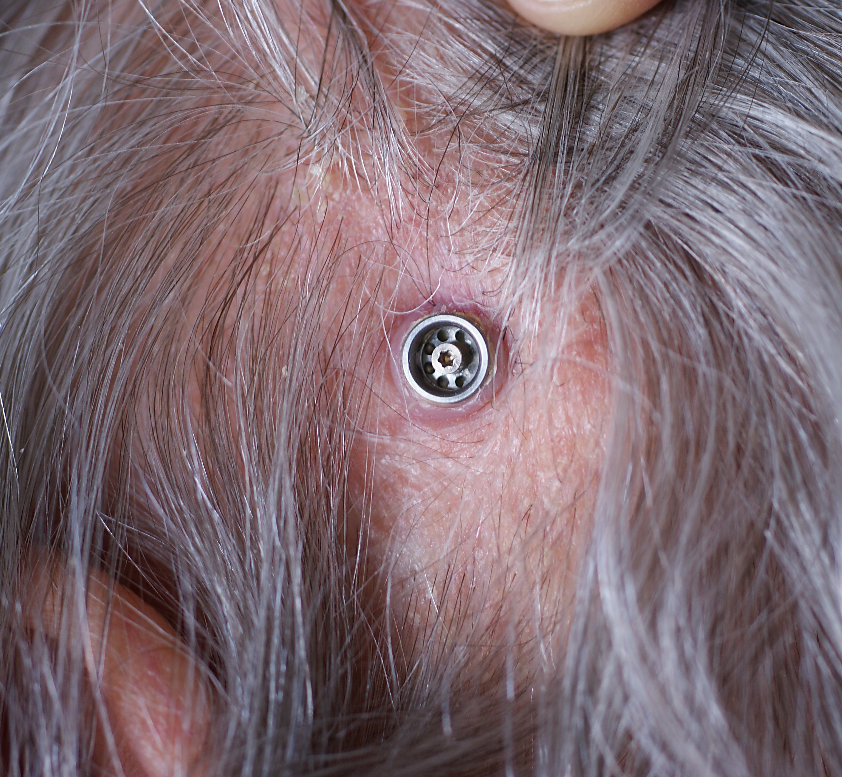 Implantierte Titanschraube um ein passendes Verstärkungsgerät anzuschliessen (bone anchored hearing aid)